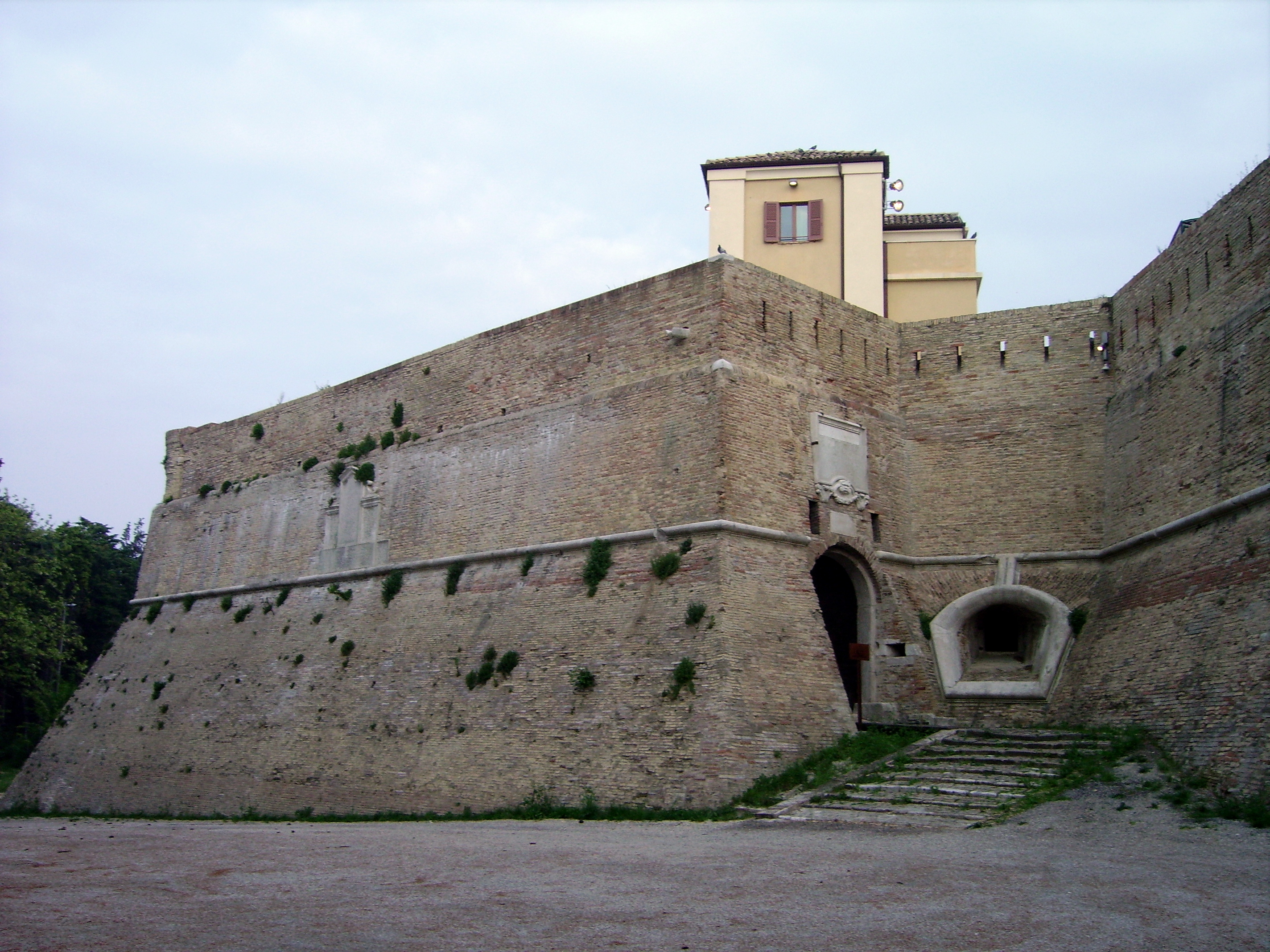 Mura esterne della Cittadella di Ancona.